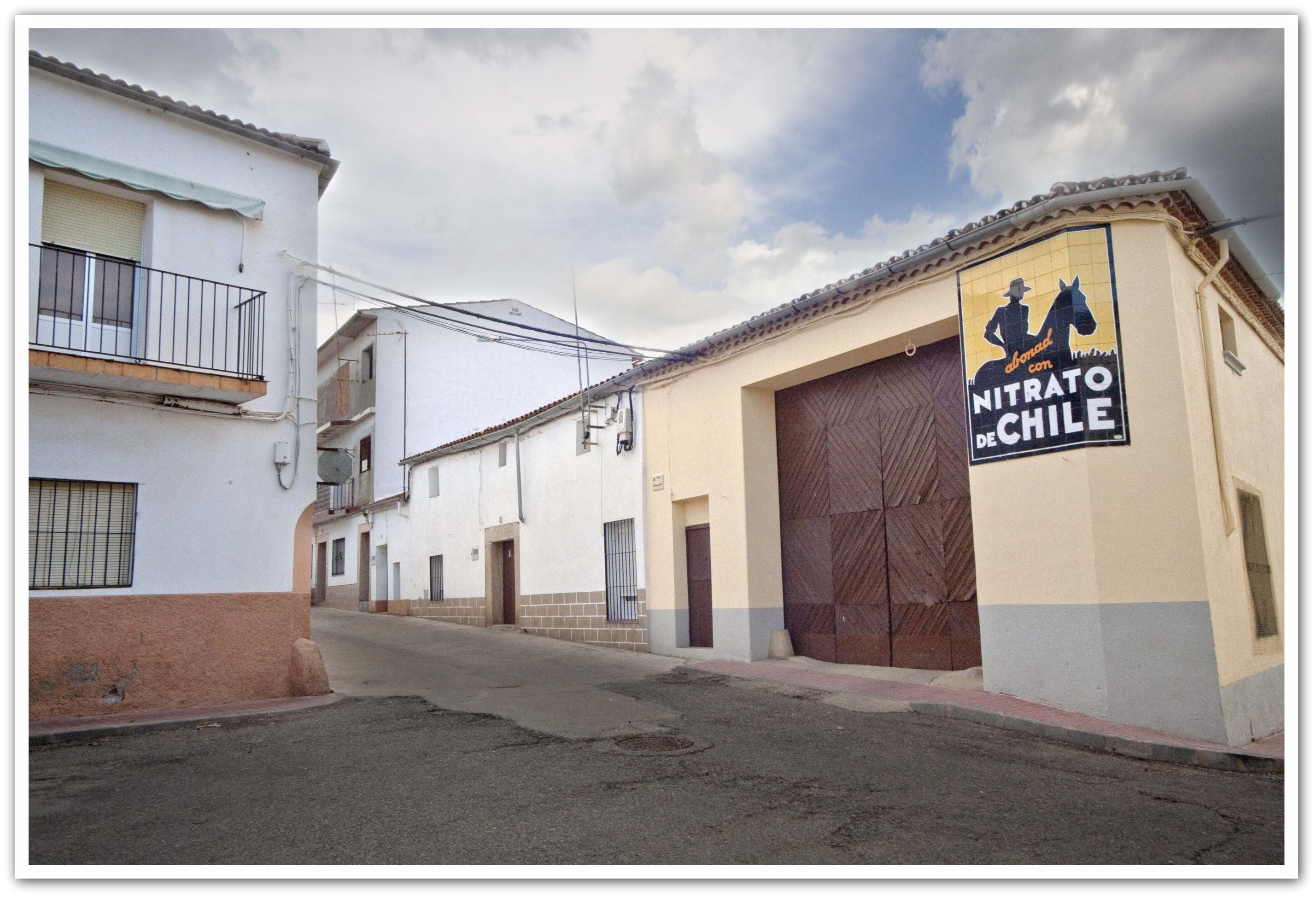 Extremadura